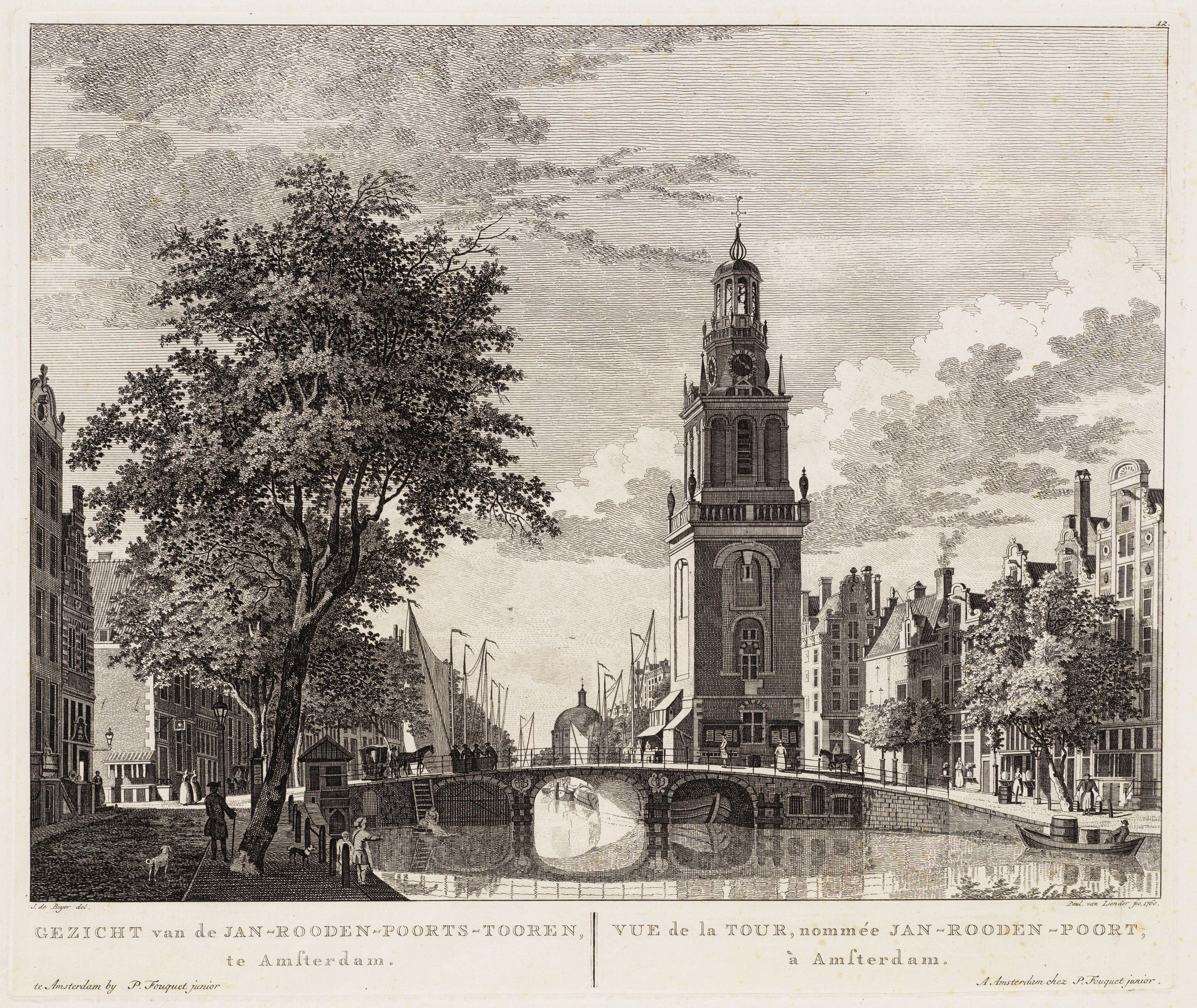 De Jan Rodenpoortstoren en de Torensluis over het Singel gezien. 1760. Ets.